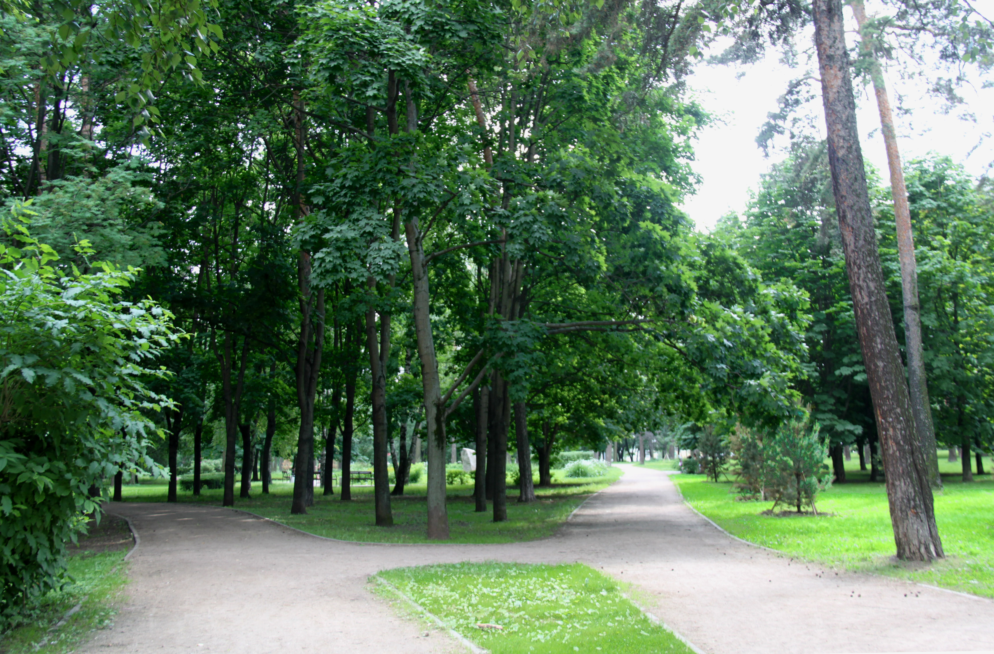 Парк Сосенки в районе Царицыно. Вид с Кавказского бульвара